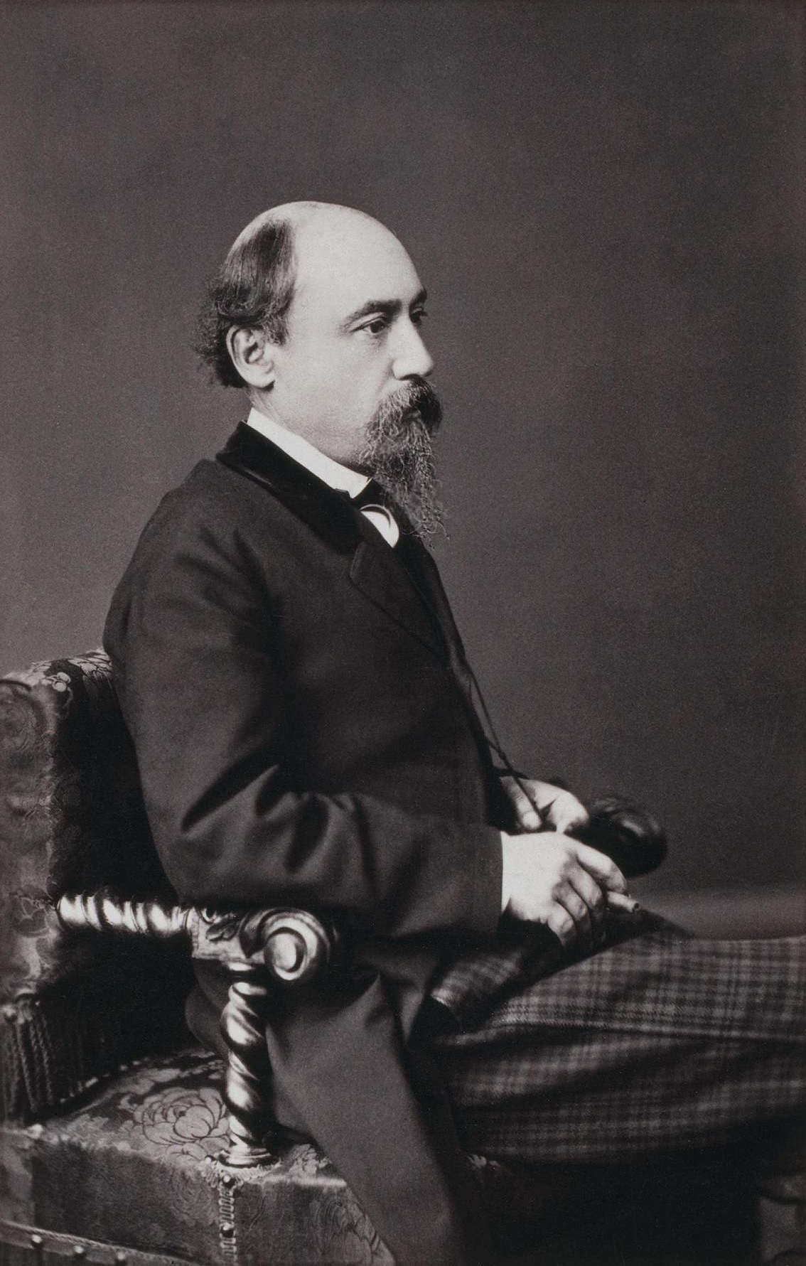 Nikolaj Alexeevic Nekrasov (1821-1878)